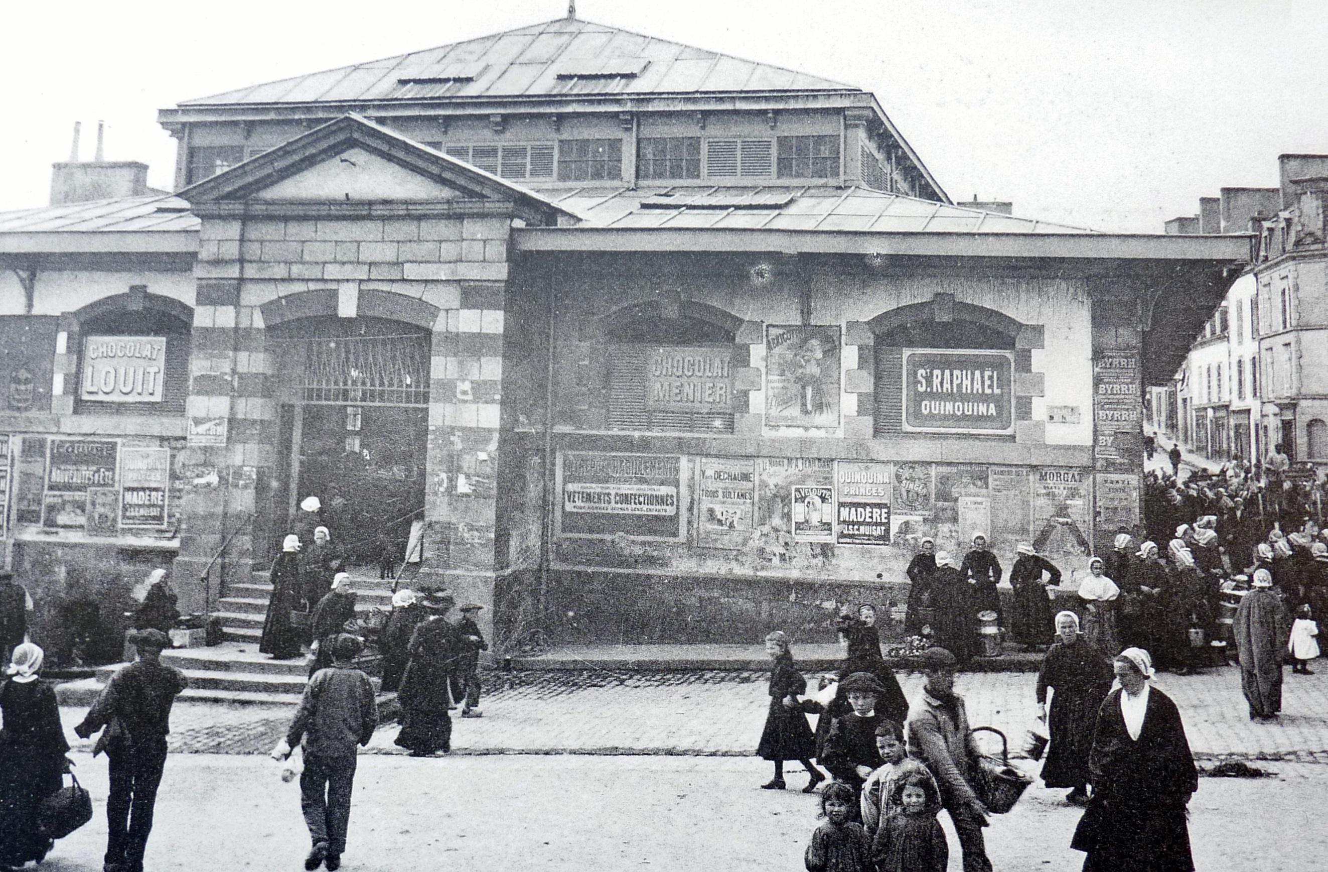 Les halles de Douarnenez vers 1908